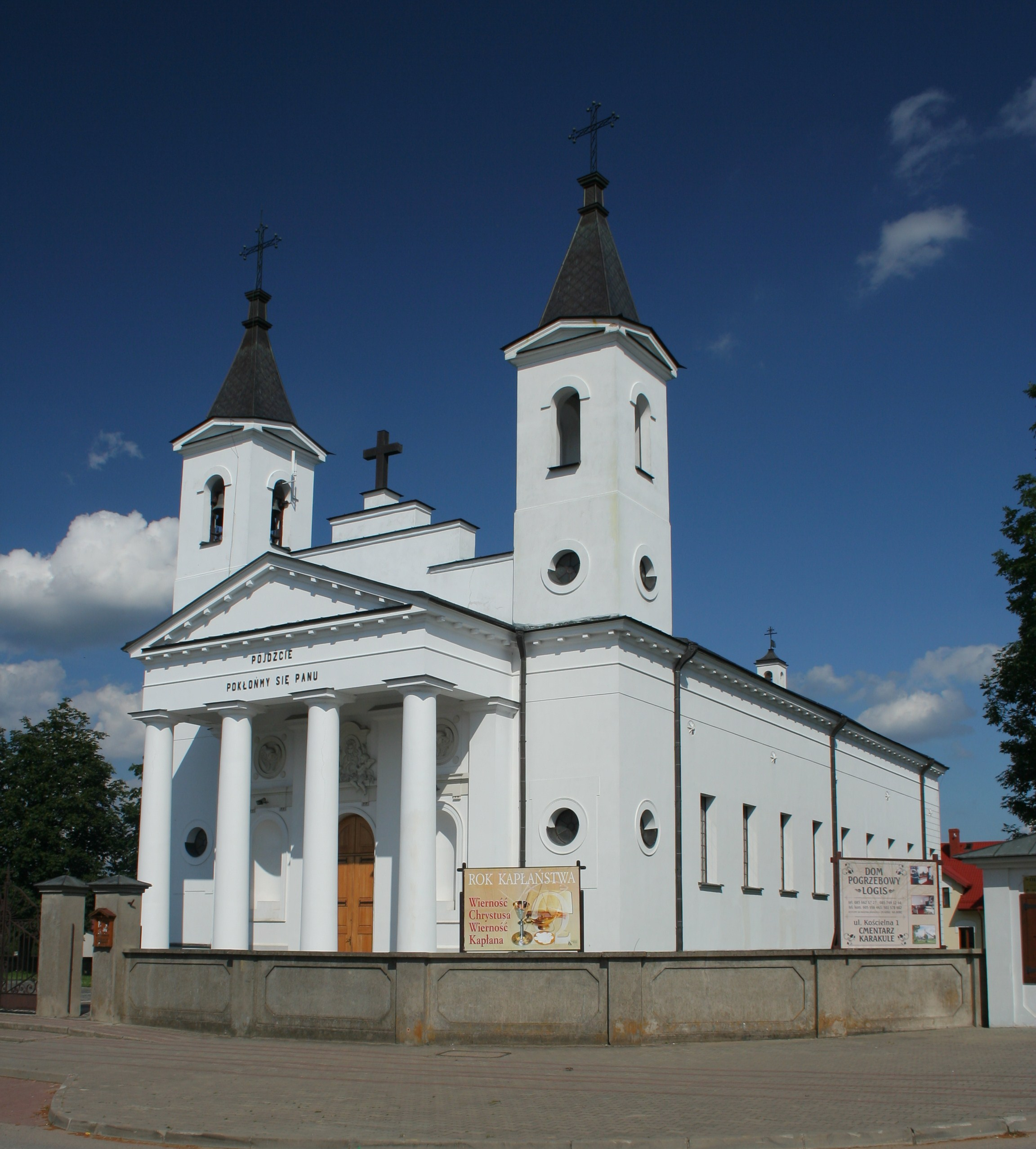 Kościół świętych Piotra i Pawła w Zabłudowie.